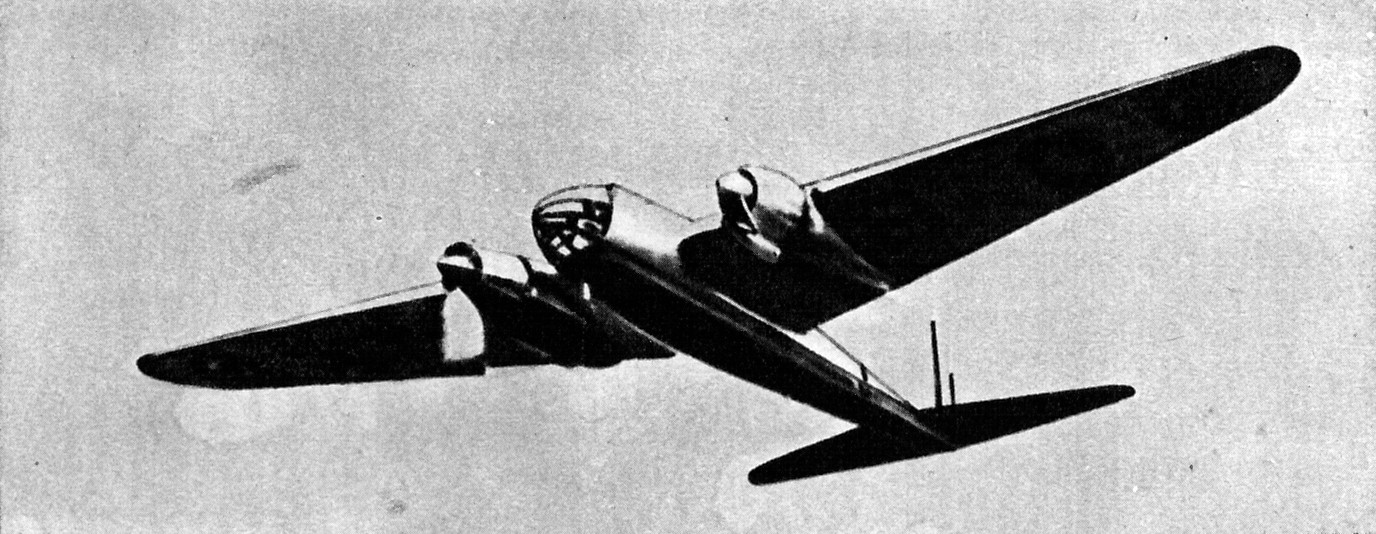 Francuski samolot bombowy Amiot 340.